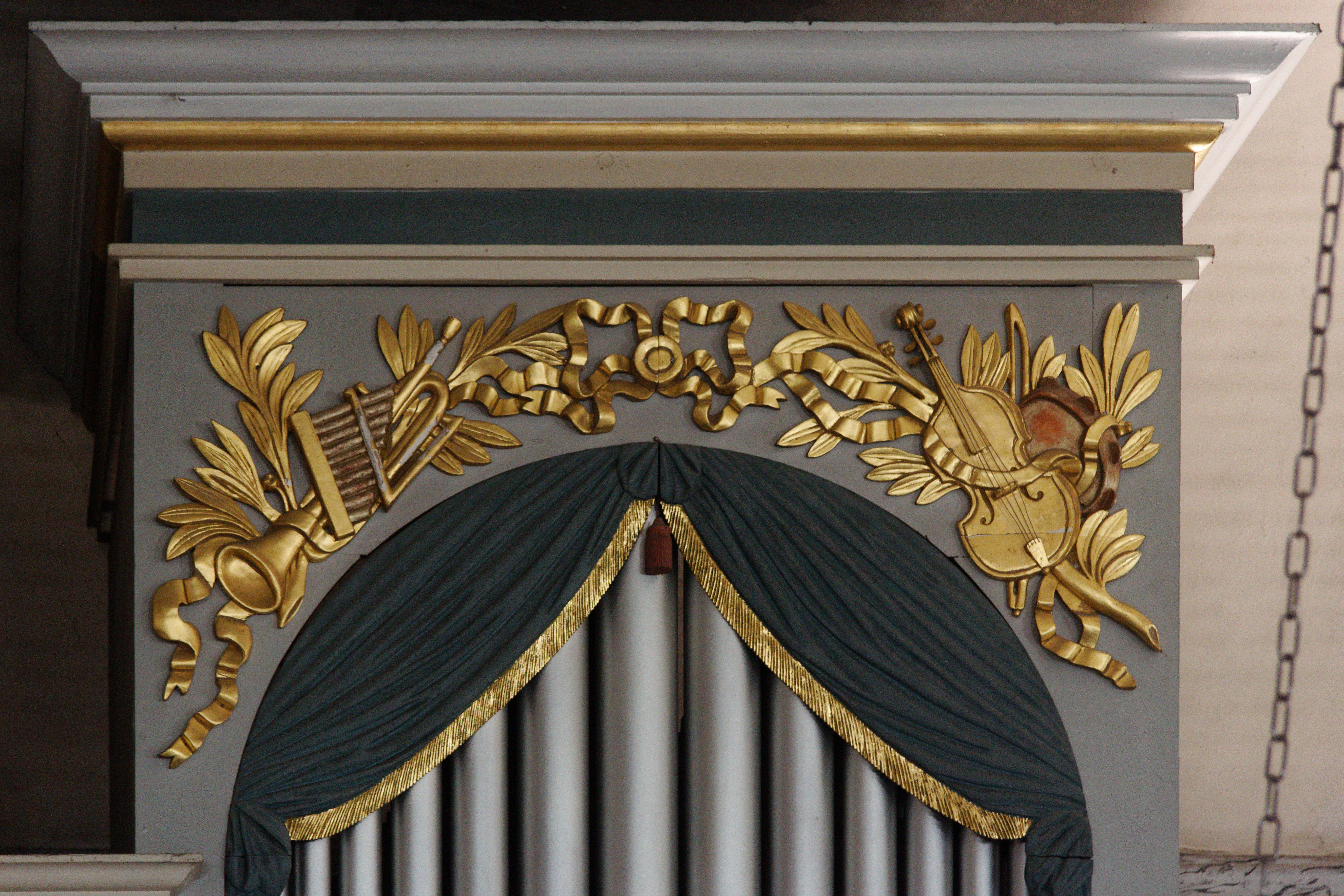 Orgelprospekt (Detail) der evangelischen Kirche in Dudenhofen, einem Stadtteil von Rodgau (Hessen).